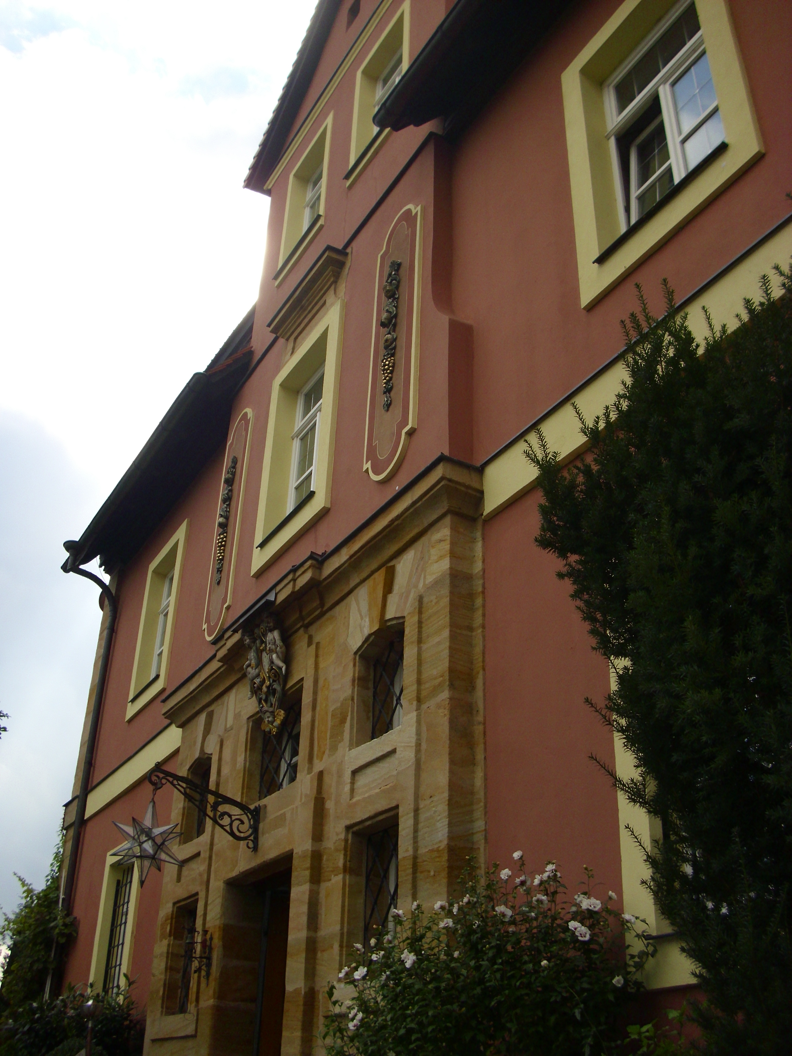 Gelbes Schloss Heroldsberg September 2010 02